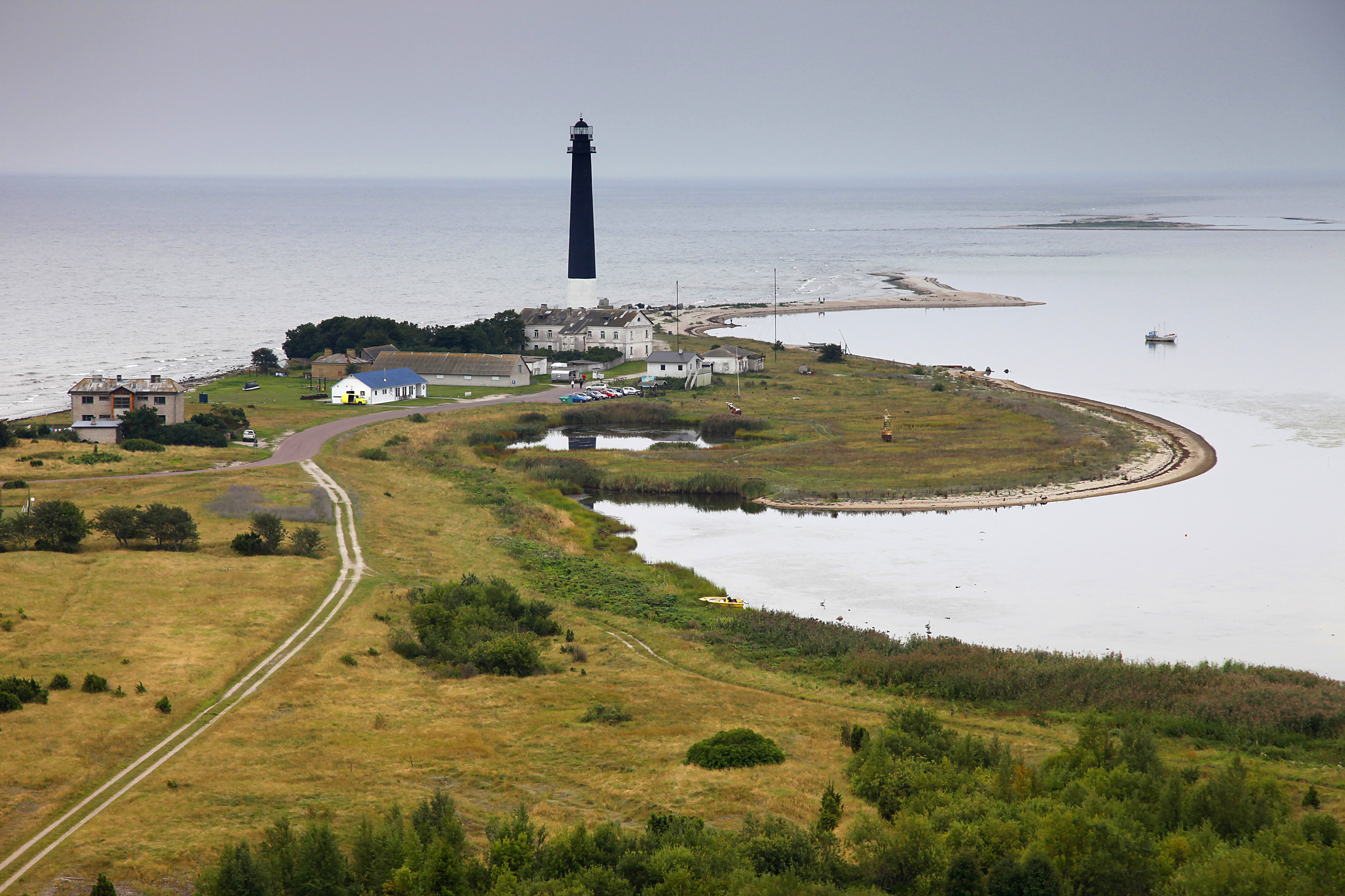 Sõrve säär tuletorniga 2009